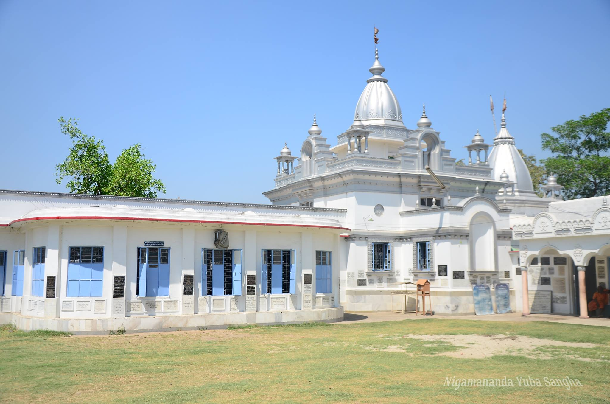 Halisahar, Kanchrapara, West Bengal, India